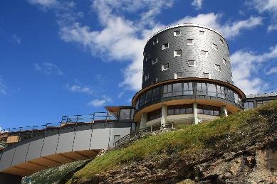 Das Bergrestaurant Hotel Malta am Ende der Malta Hochalmstraße in Kärnten, Österreich